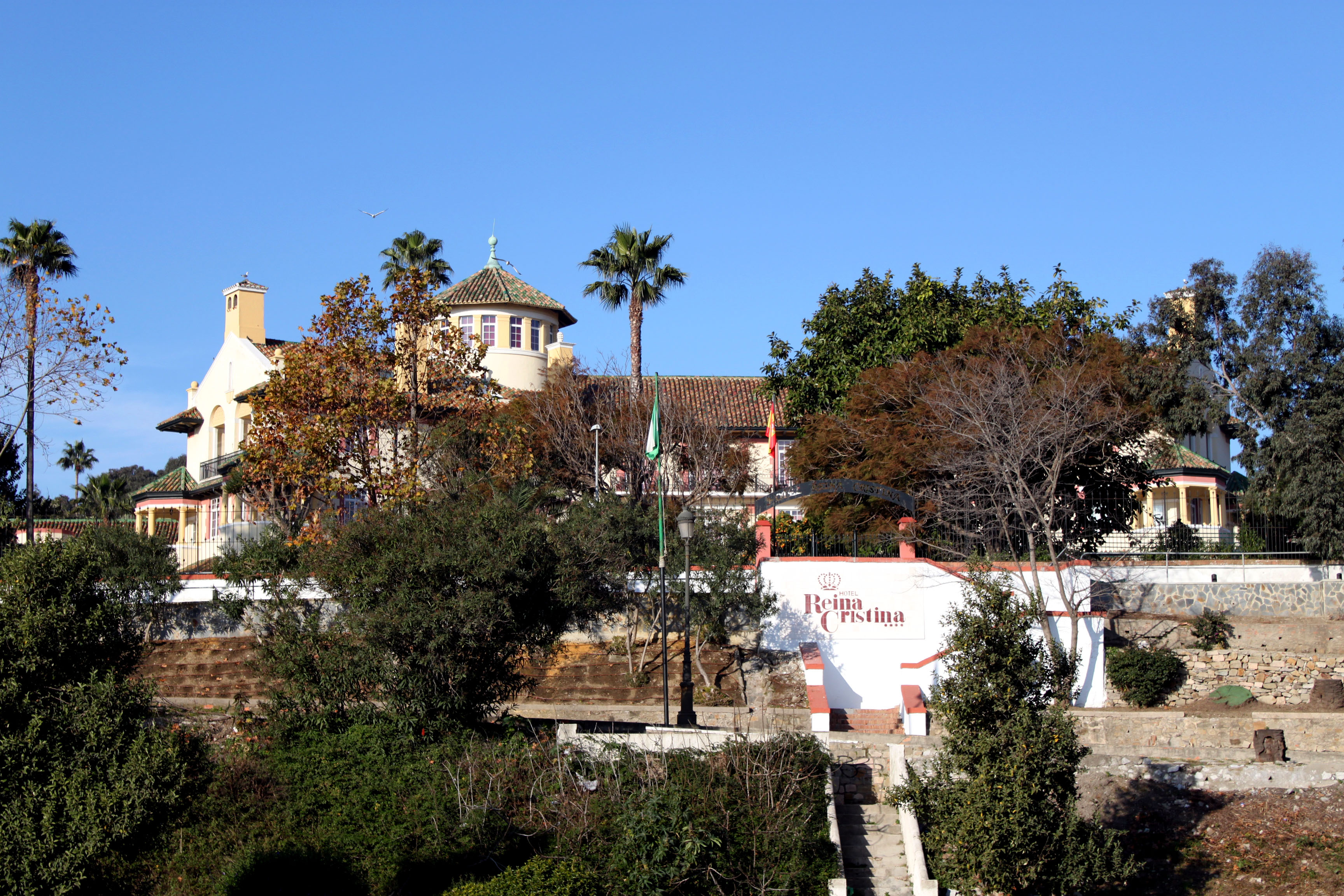 Hotel Reina Cristina de Algeciras, Andalucía, España.